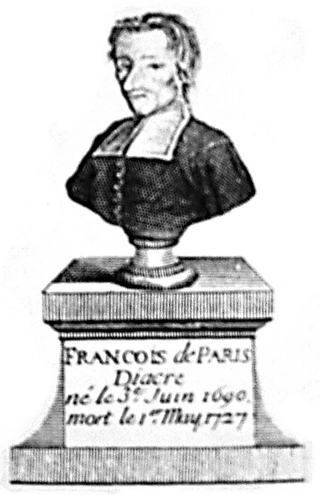 Version nettoyée du buste de François Pâris